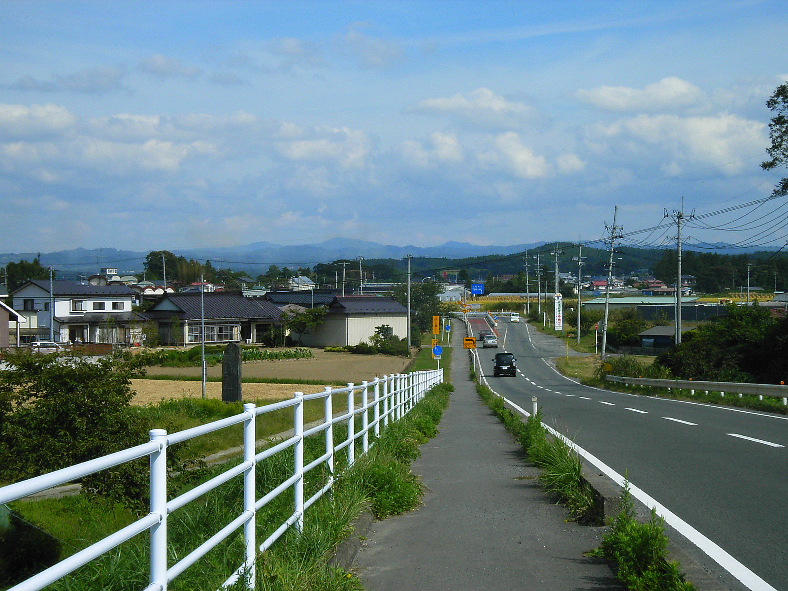 Miyagi Prefectural Road 183. Kurihara, Miyagi prefecture, Japan.